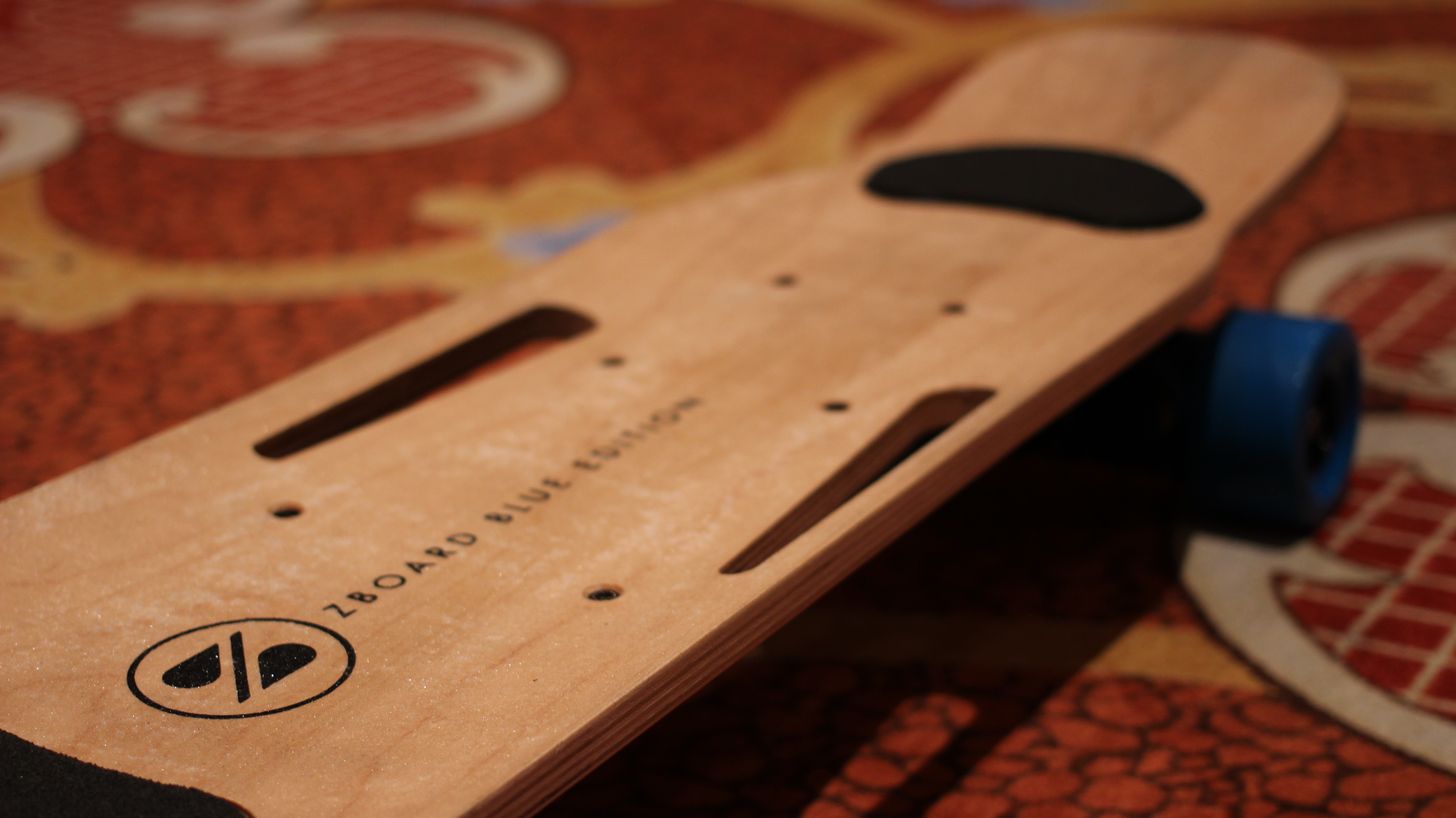 ZBoard 2 Electric Skateboards